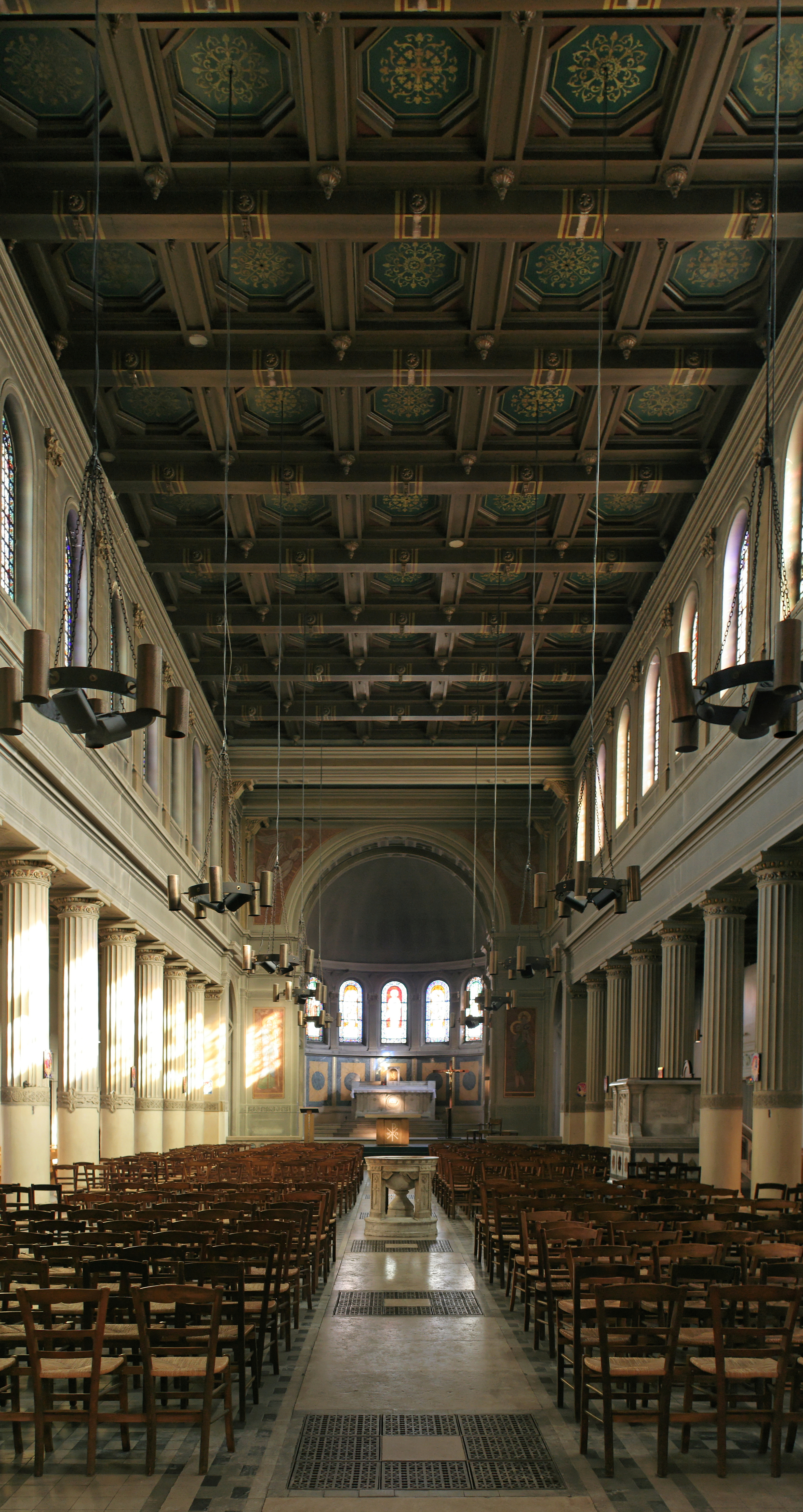 Église Saint-Jacques Saint-Christophe de la Villette, Vue de la nef.